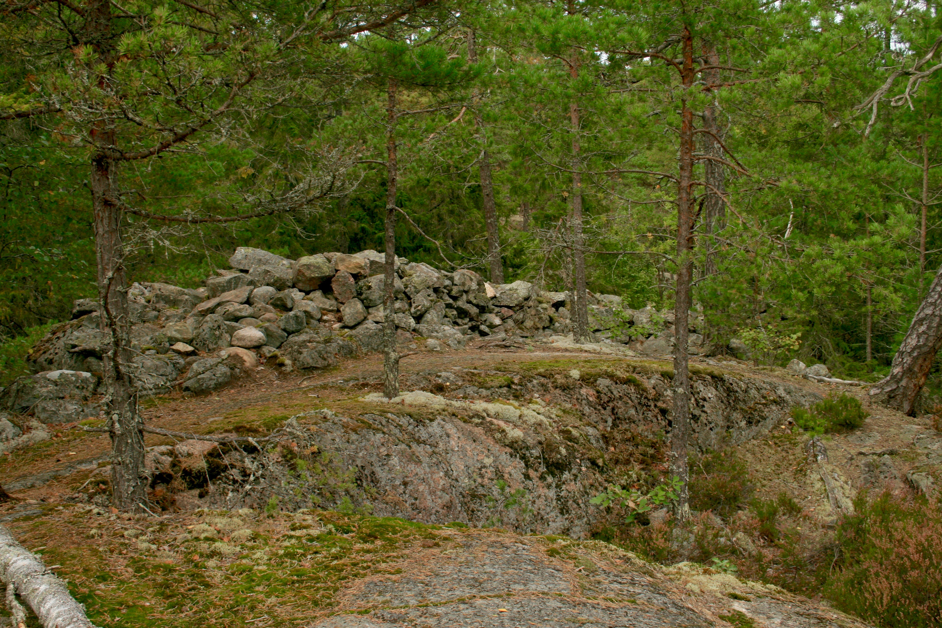 Ruines de la colline fortifiée au nord de Stensjön dans le parc national de Tyresta